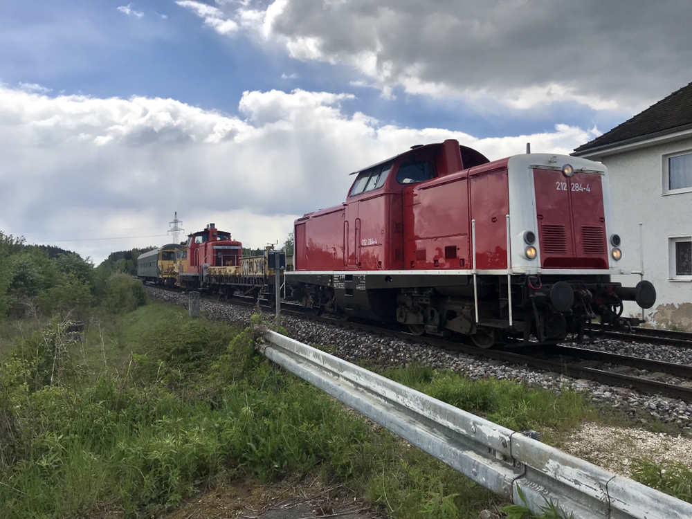 212 284-4 mit 363 661-0 bei Schwandorf